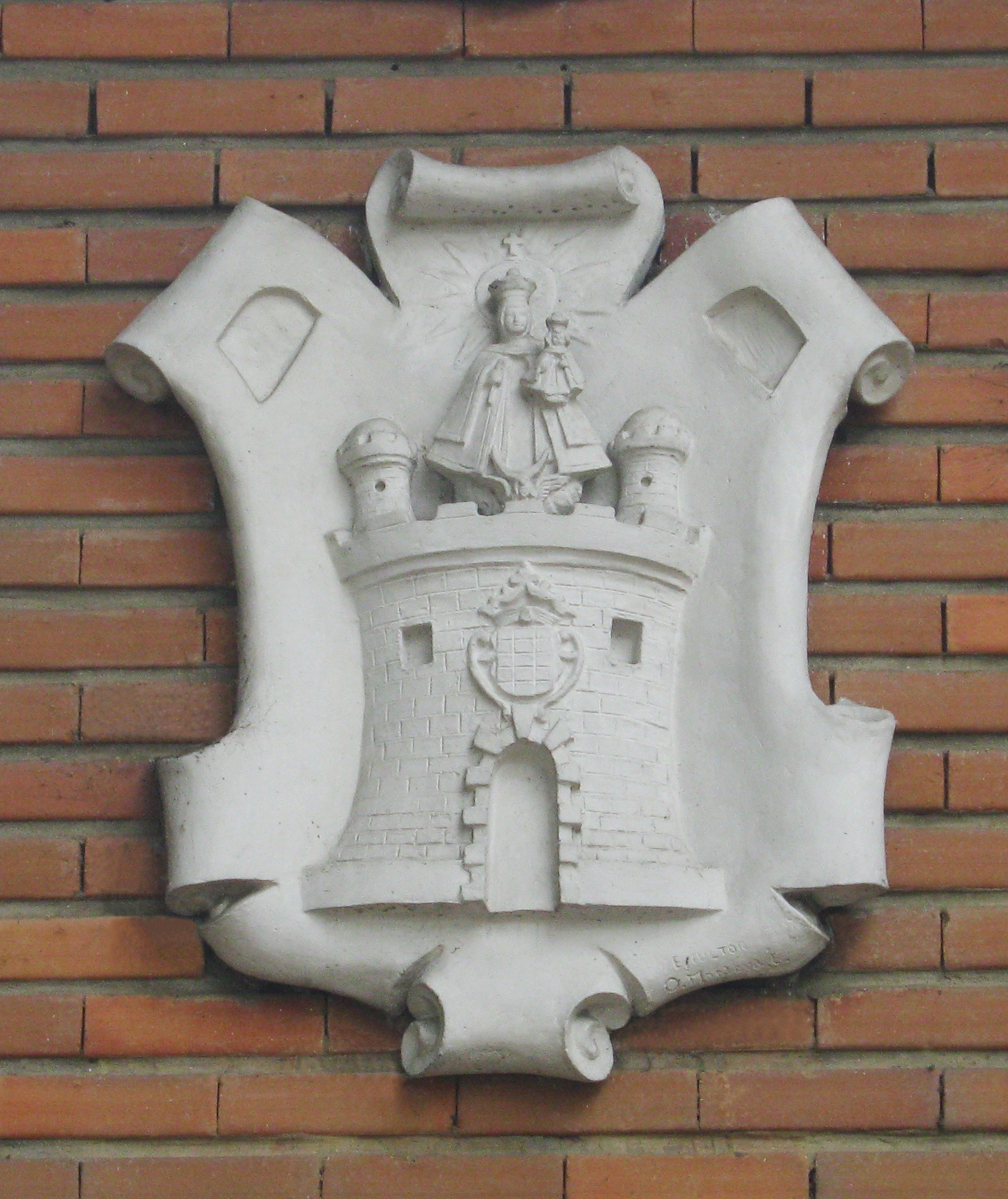 Escudo de Armas de Medellín (Colombia), obra del escultor Octavio Montoya, ubicado en el Jardín Botánico de Medellín. Técnica: concreto y yeso pintado.